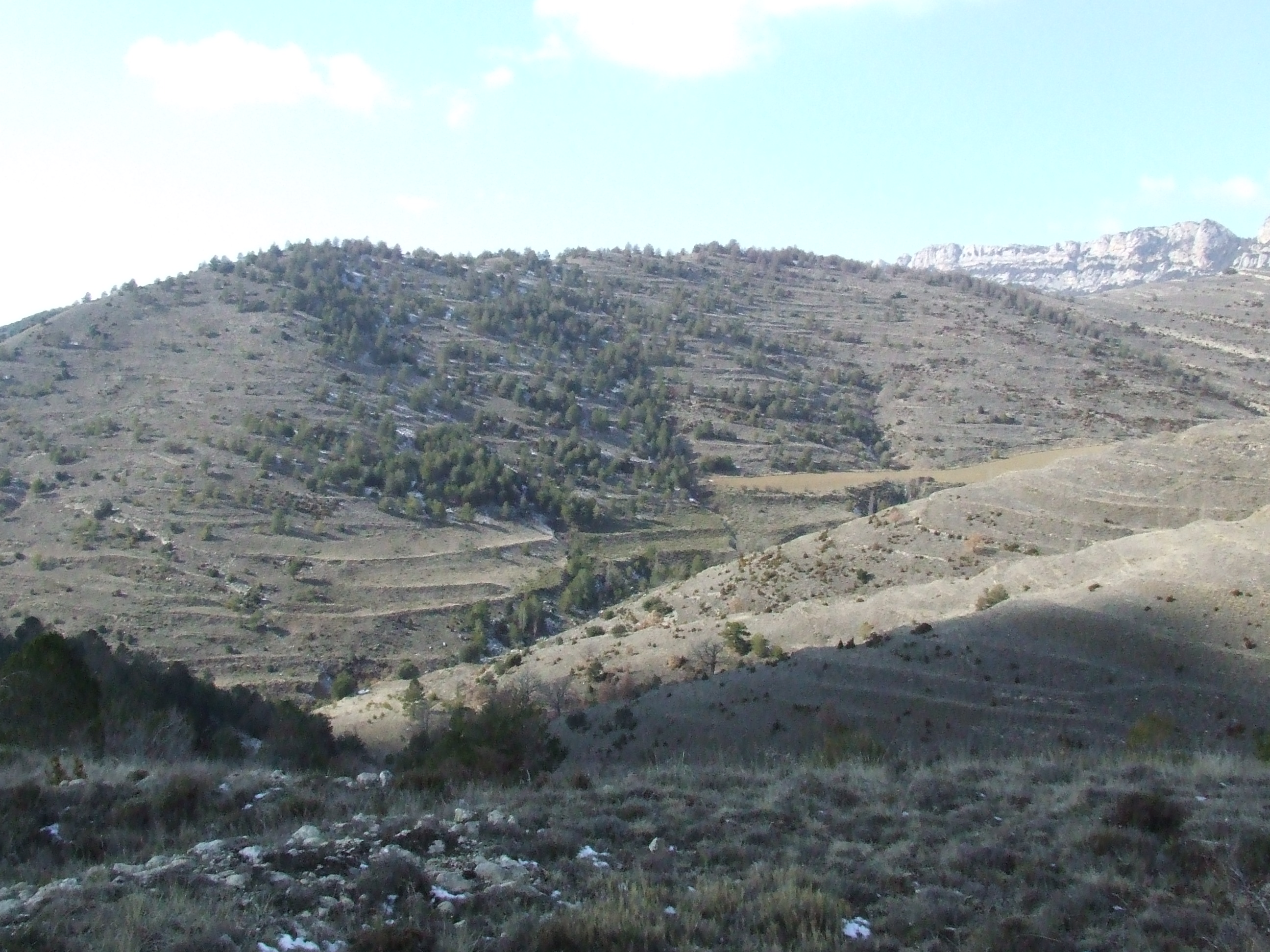 Puigvent i l'Era Vella (la Torre d'Eroles, Abella de la Conca, Pallars Jussà)